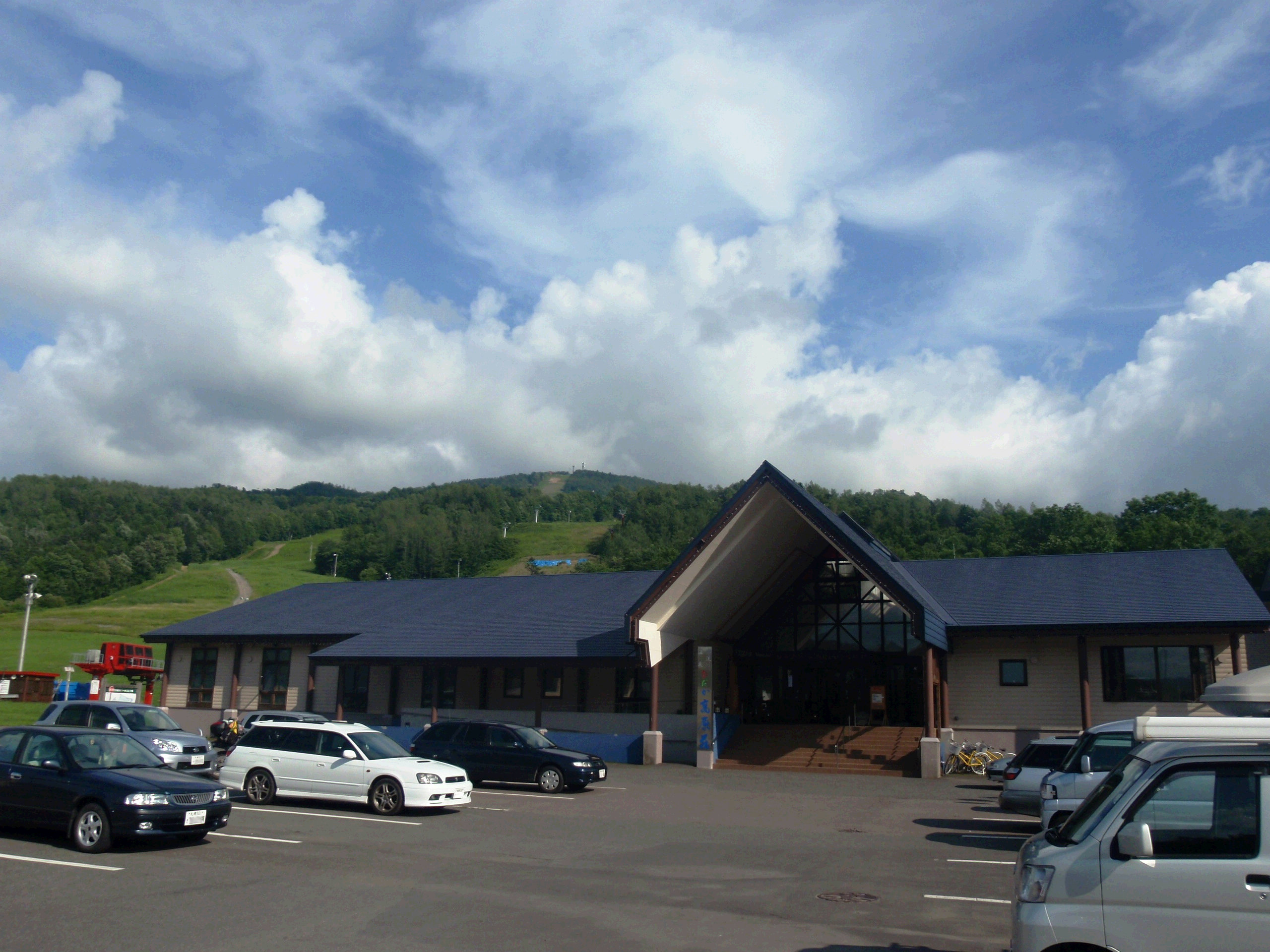 沙流川温泉、ひだか高原荘